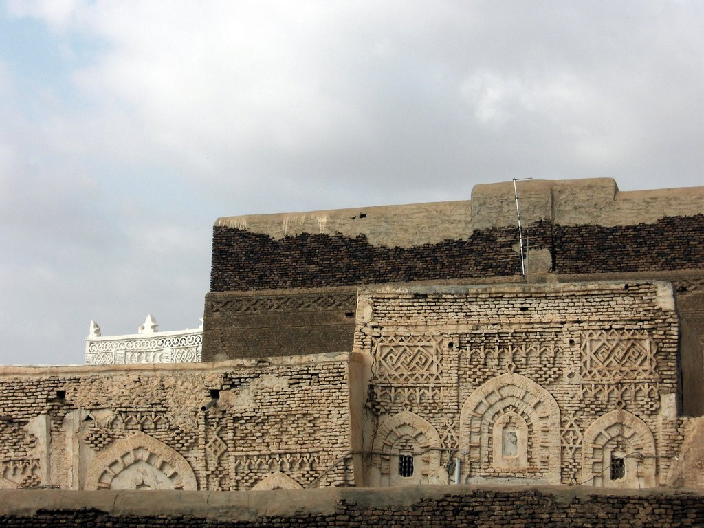 Zabid bricks - Yemen